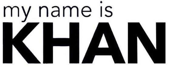 Logo